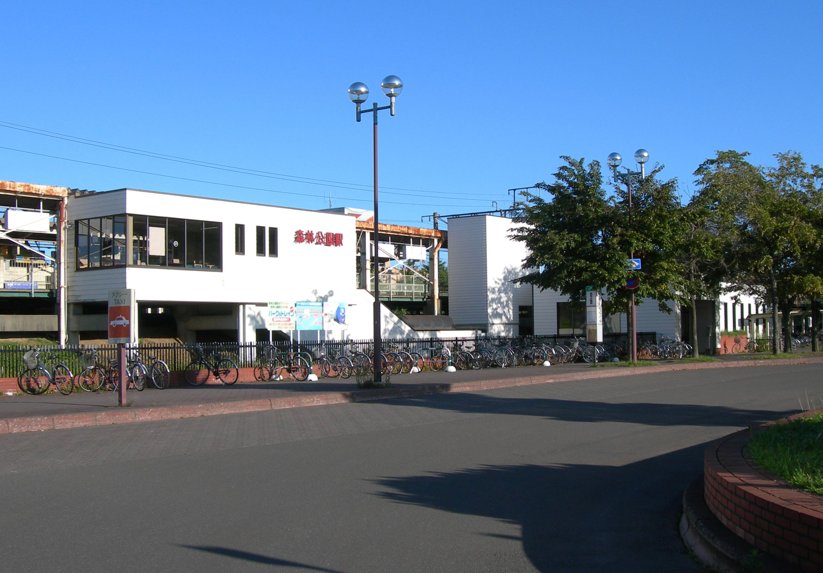 森林公園駅東口